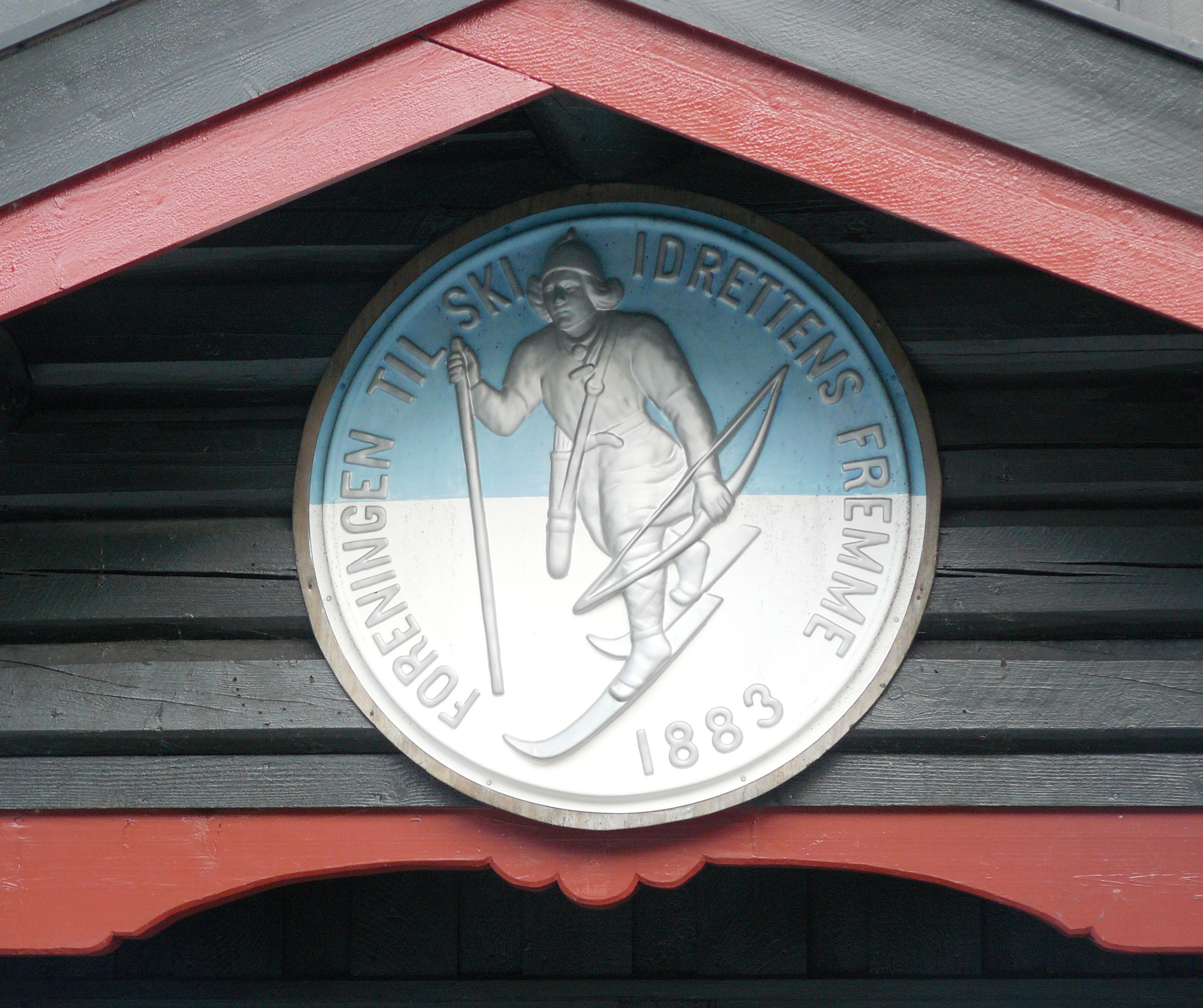 Skiforeningens seal